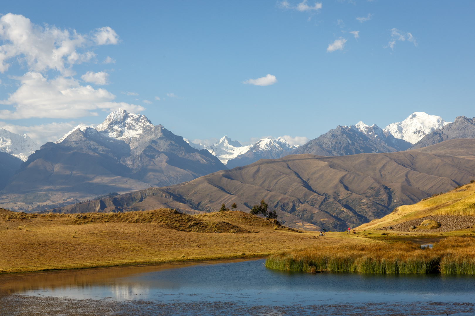 Laguna Wilcacocha, Huaraz - Ancash - Peru.